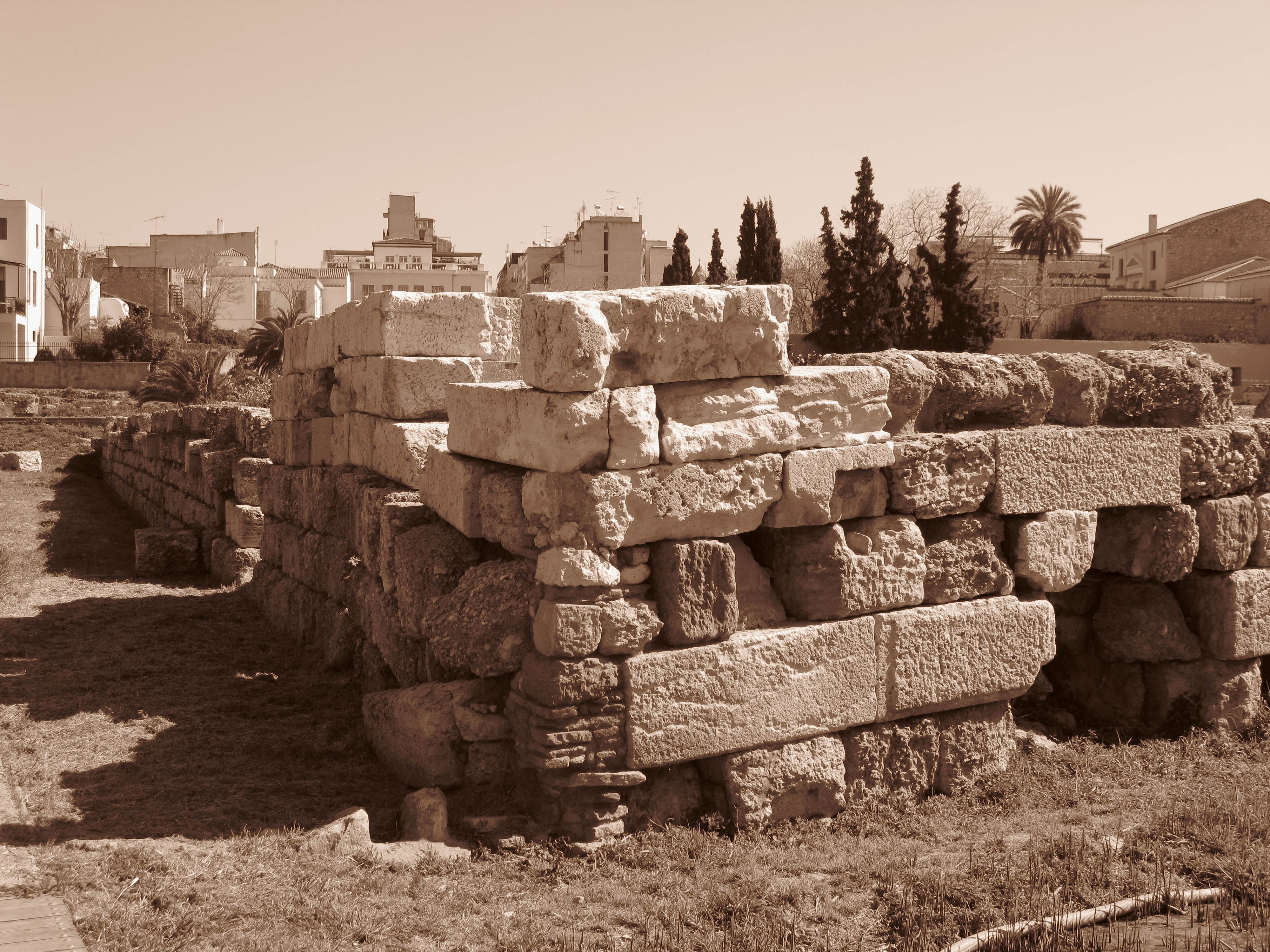 Κεραμεικός, Αρχαίο νεκροταφείο, Αθήνα.